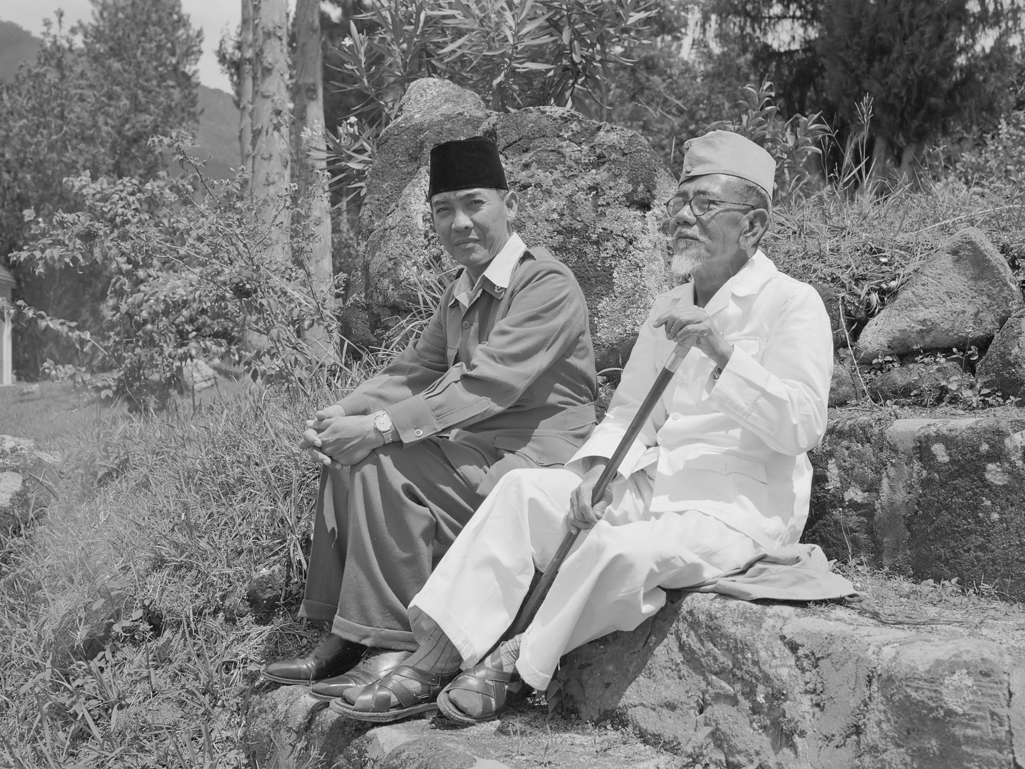 Repronegatief. President Soekarno tijdens een wandeling met Hadji Agus Salim